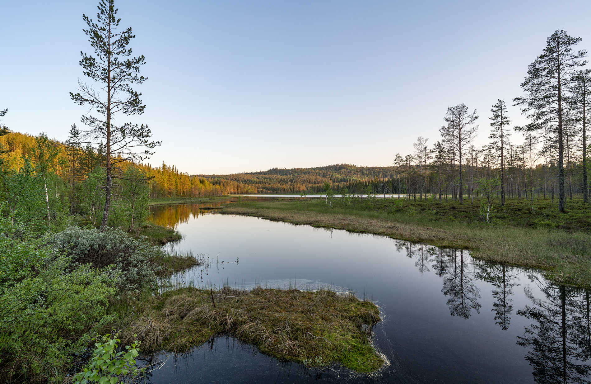 Norra sidan av Bränntjärnen strax före solnedgången